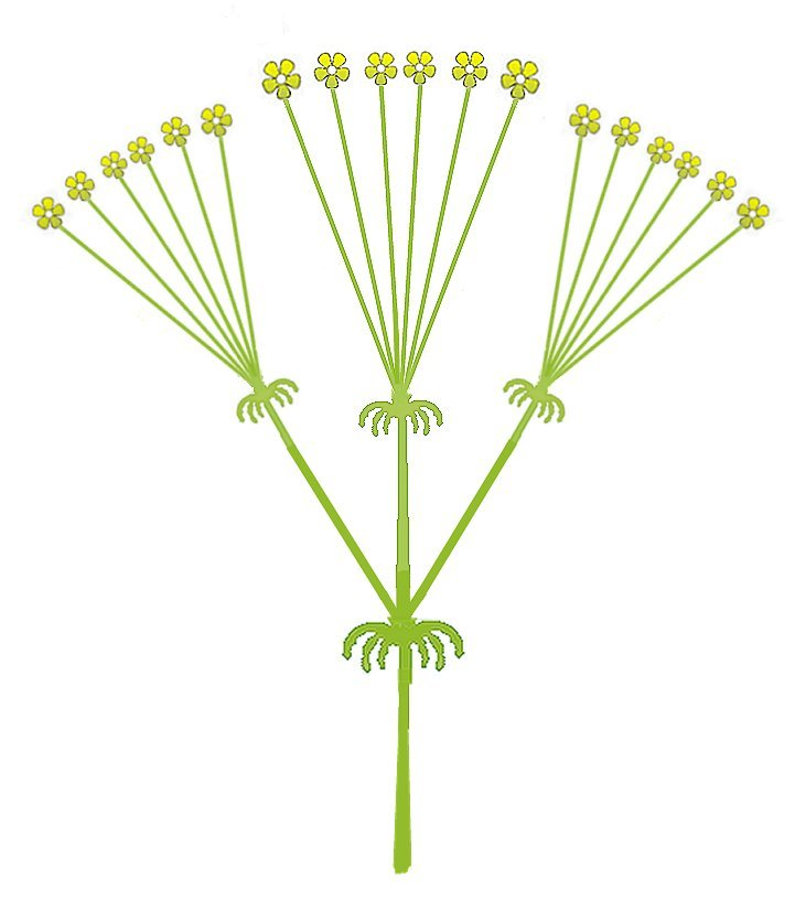 (samengesteld scherm) Umbel